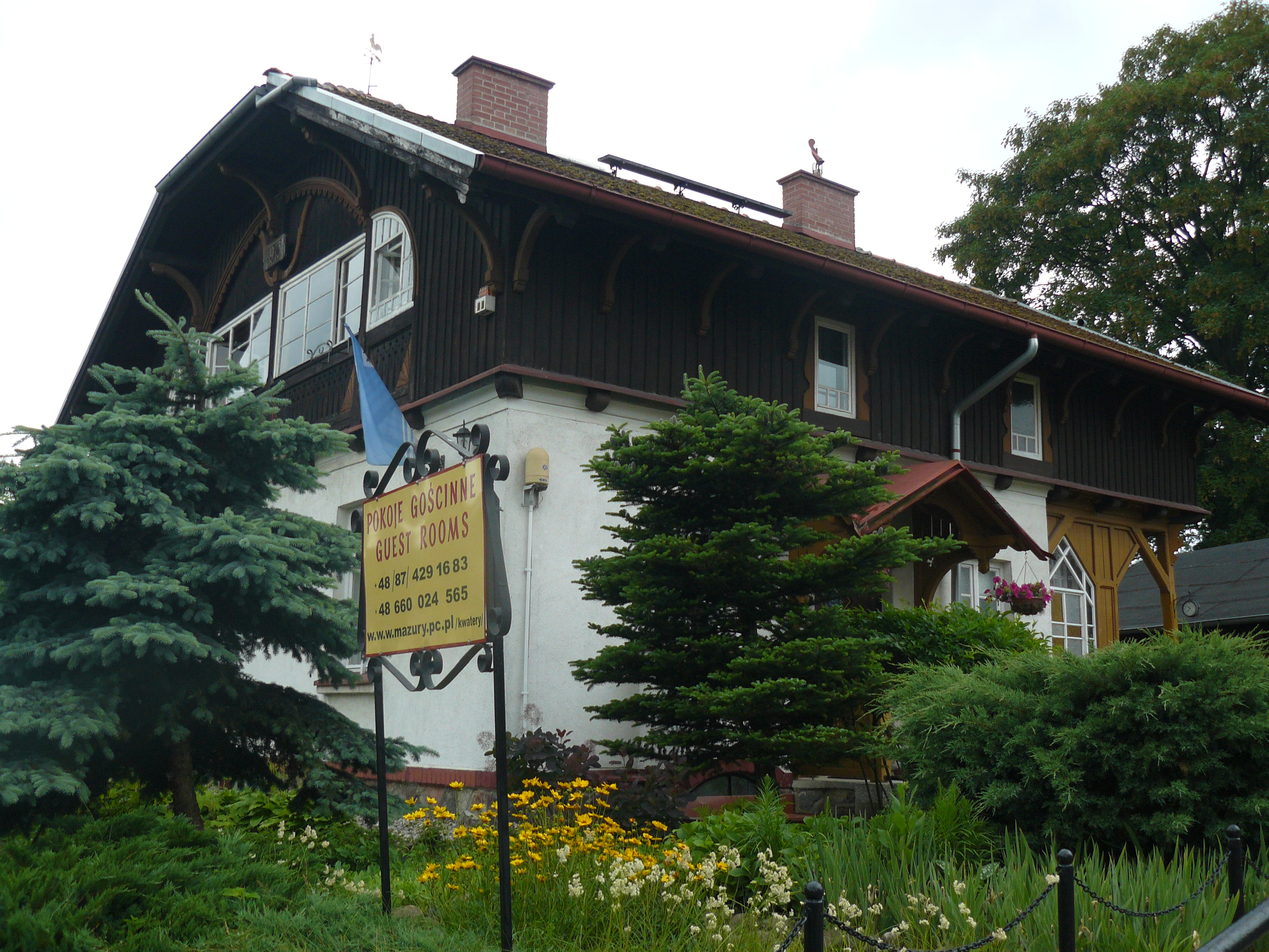 Giżycko, dom, w którym mieszkał pierwszy burmistrz Giżycka pan Jan Mieczaniec